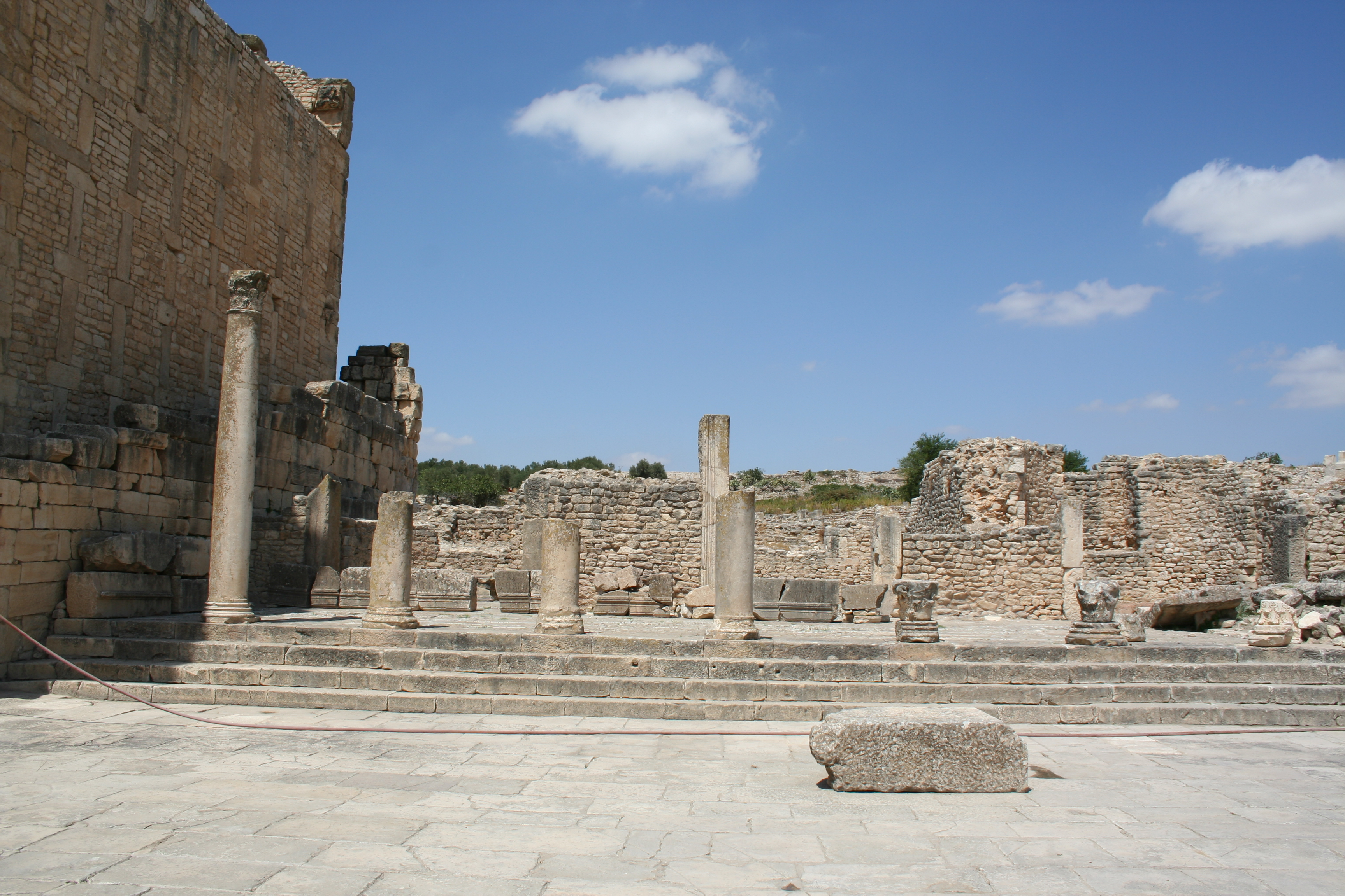 temple de Mercure sur la place de la rose des vents, Dougga